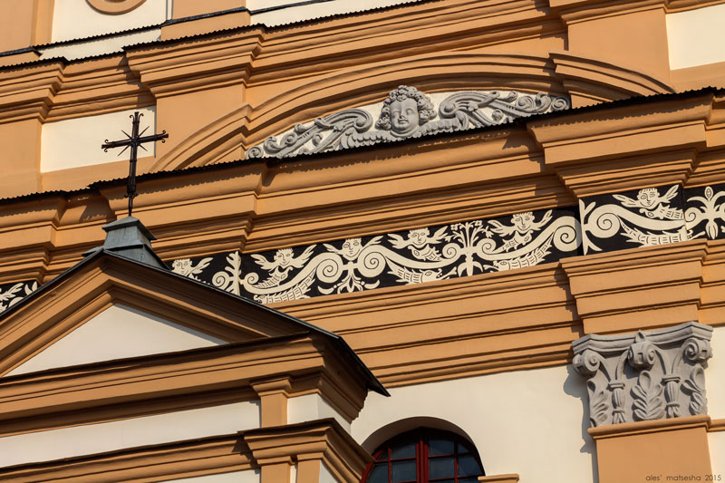 Гродна. Касцёл Дабравешчання Найсвяцейшай Дзевы Марыі. Дэталь